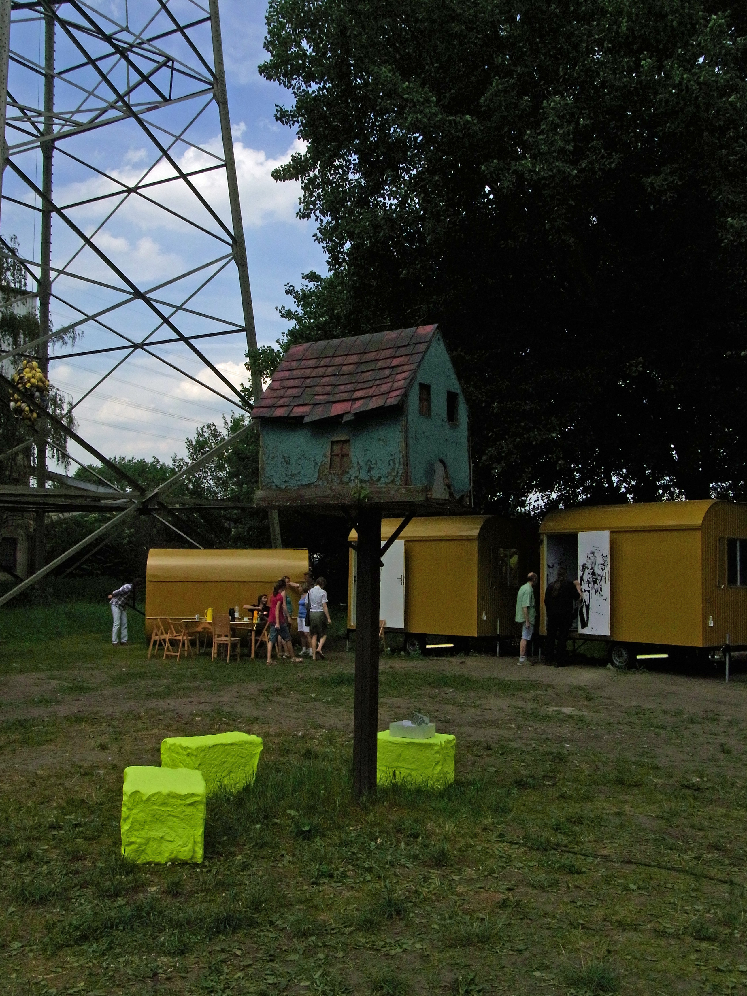 Emscherkunst.2010 Kunstakademie Münster: Das goldene Dorf - BASIS